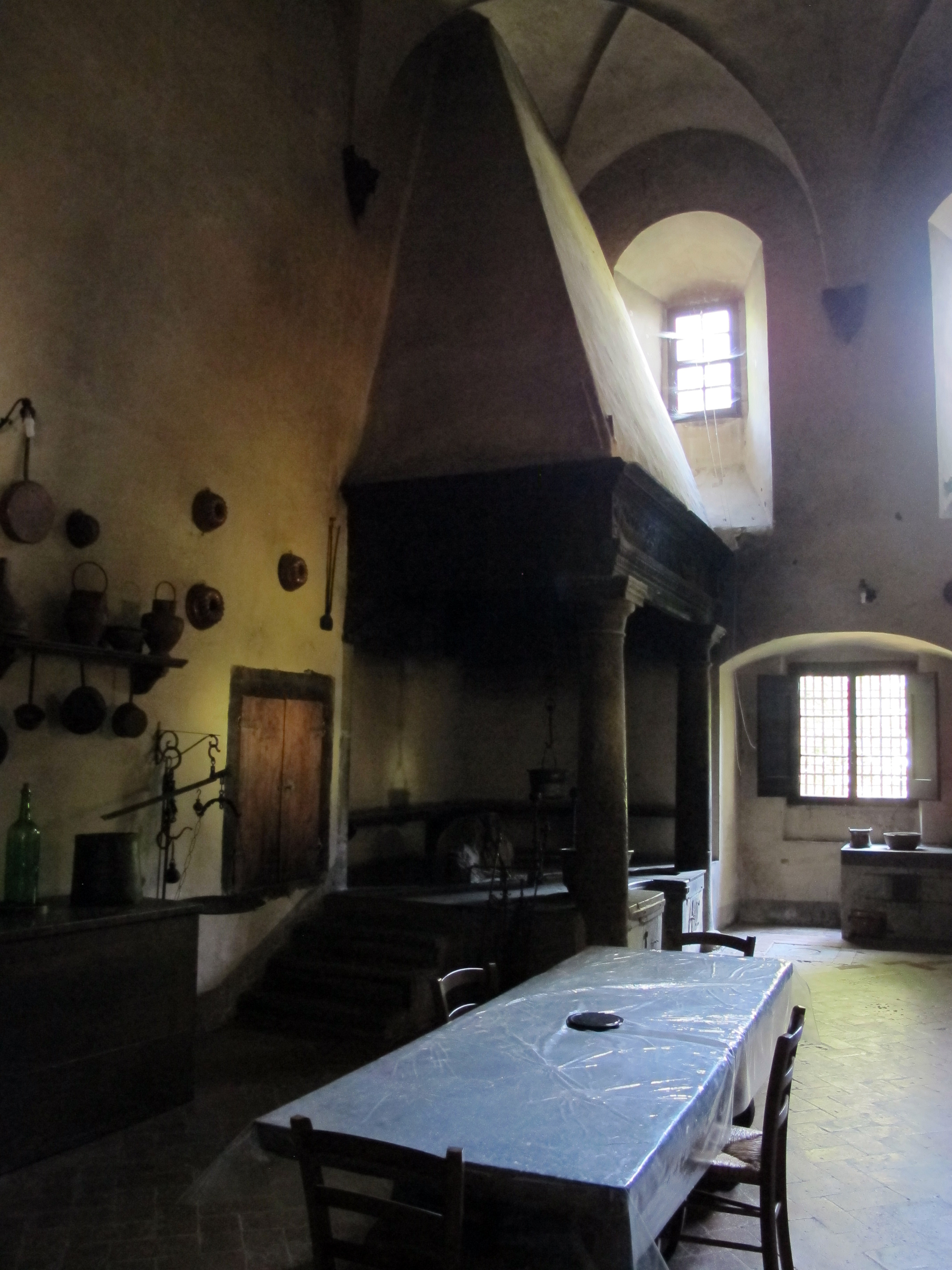 Abbazia di San Michele Arcangelo a Passignano